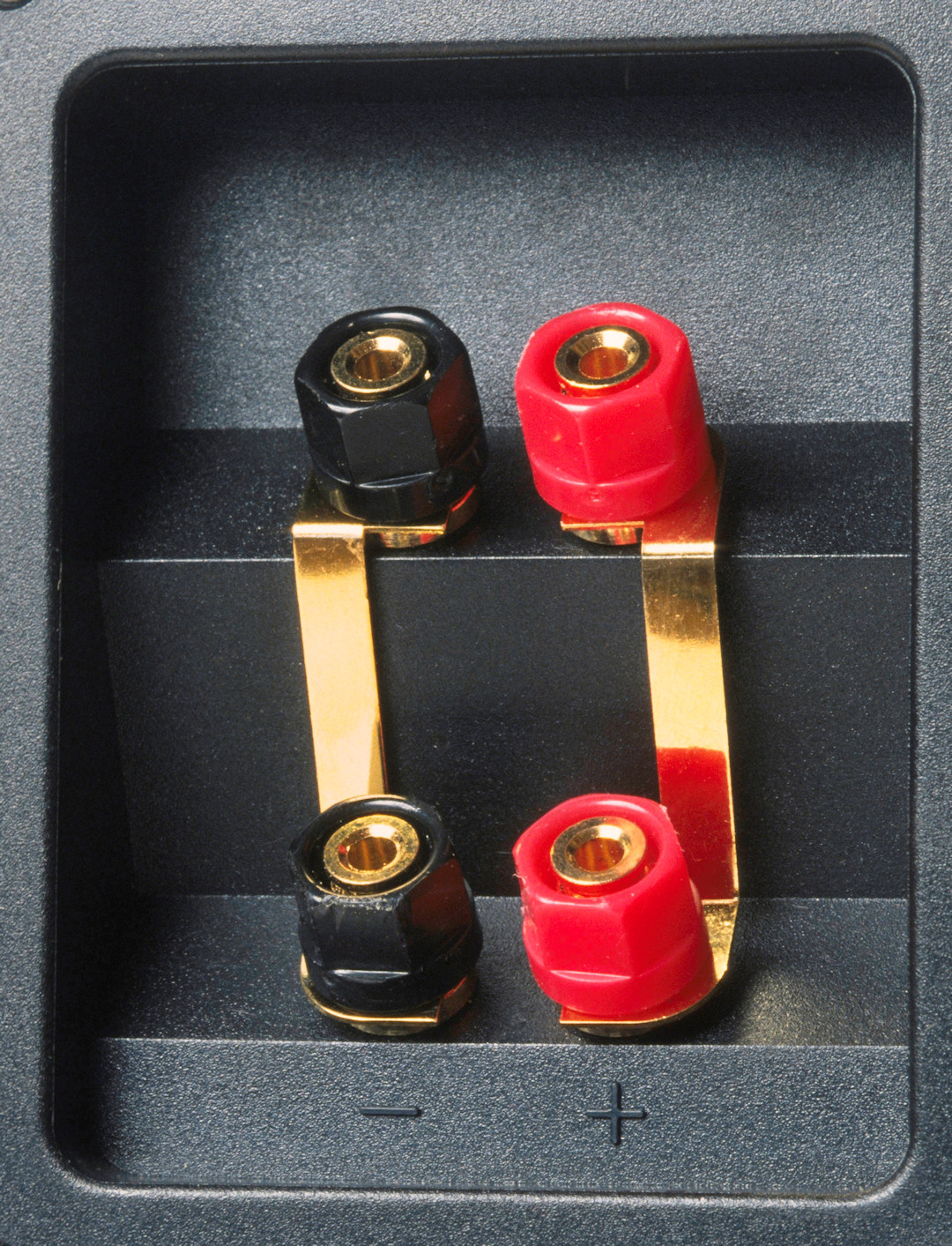 Bornes avec cavaliers permettant la bi-amplification passive